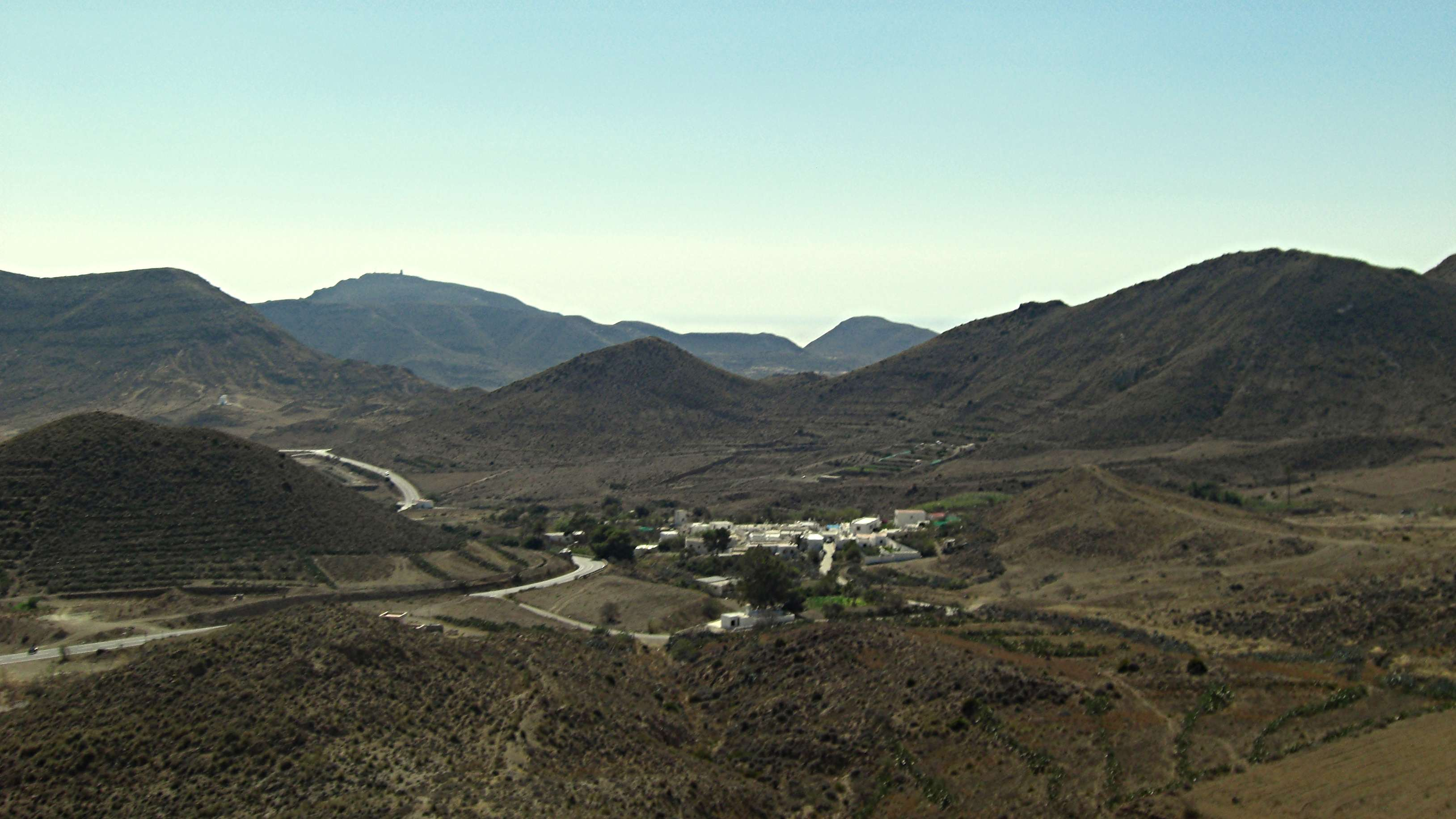 Localidad de Las Hortichuelas, en el municipio de Níjar (provincia de Almería, España)